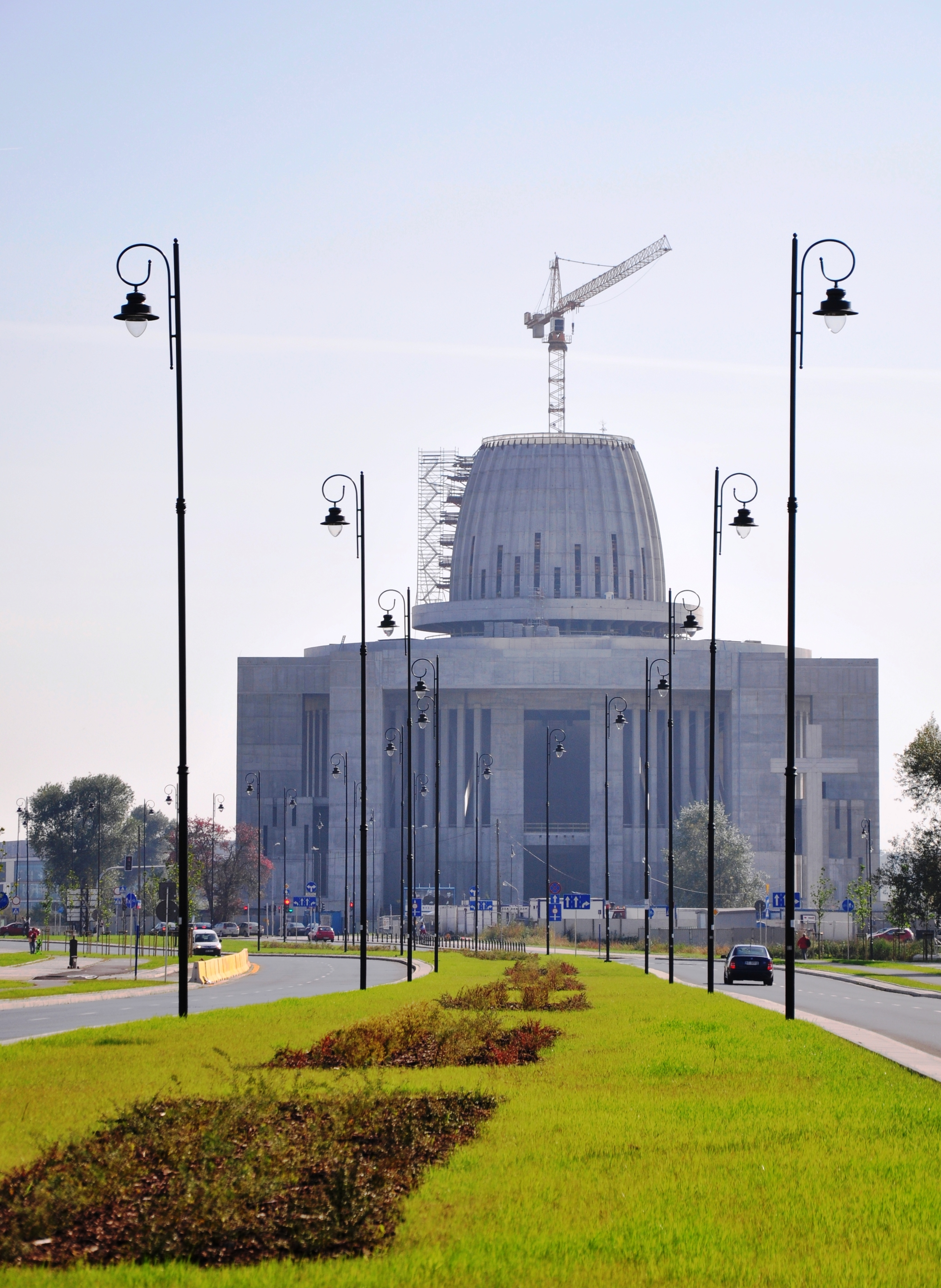 Heiligtum Wilanow, September 2010, von neuer Verlängerung Sobieskiego aus gesehen (in Richtung Powsin)